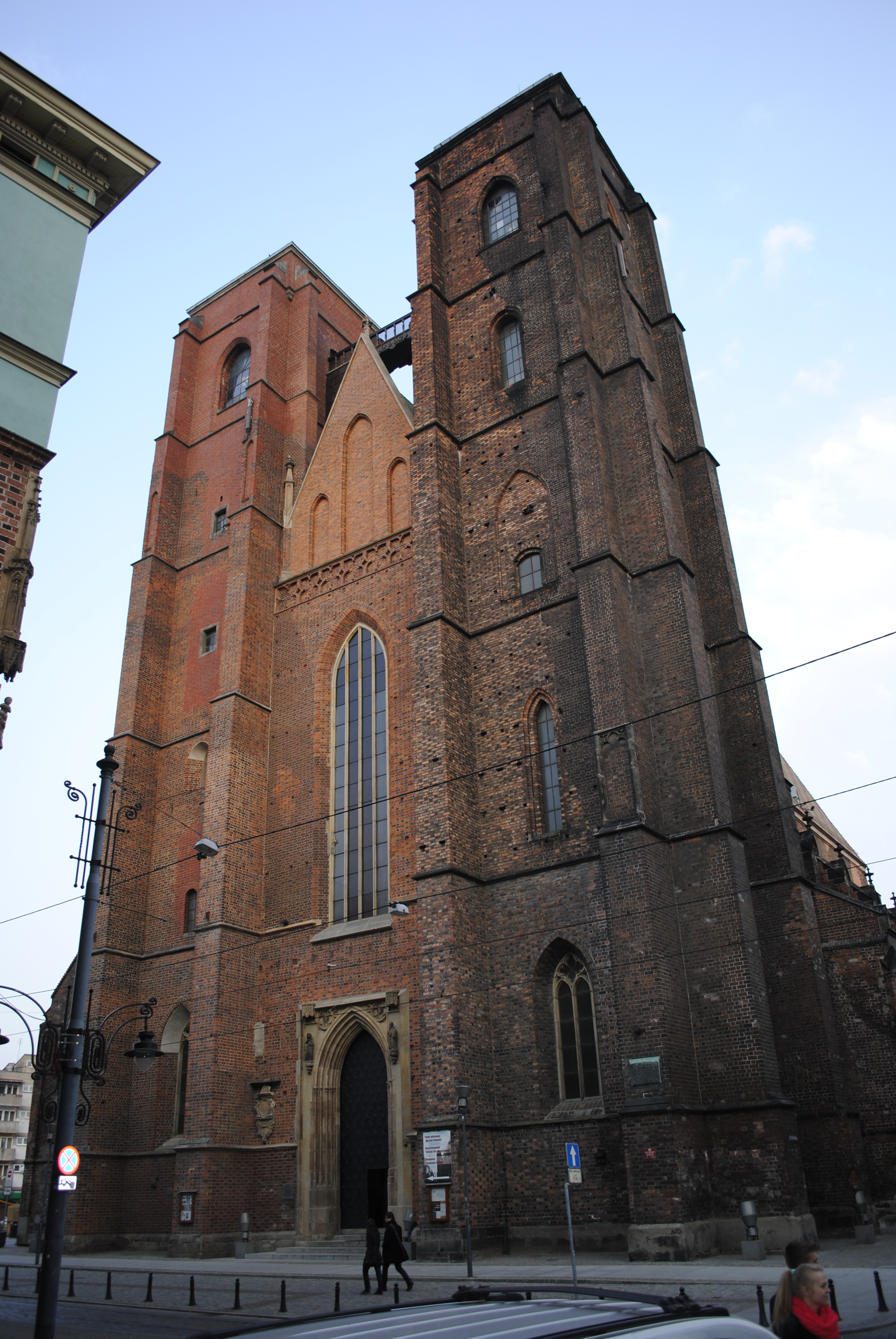 Magdalenenkirche